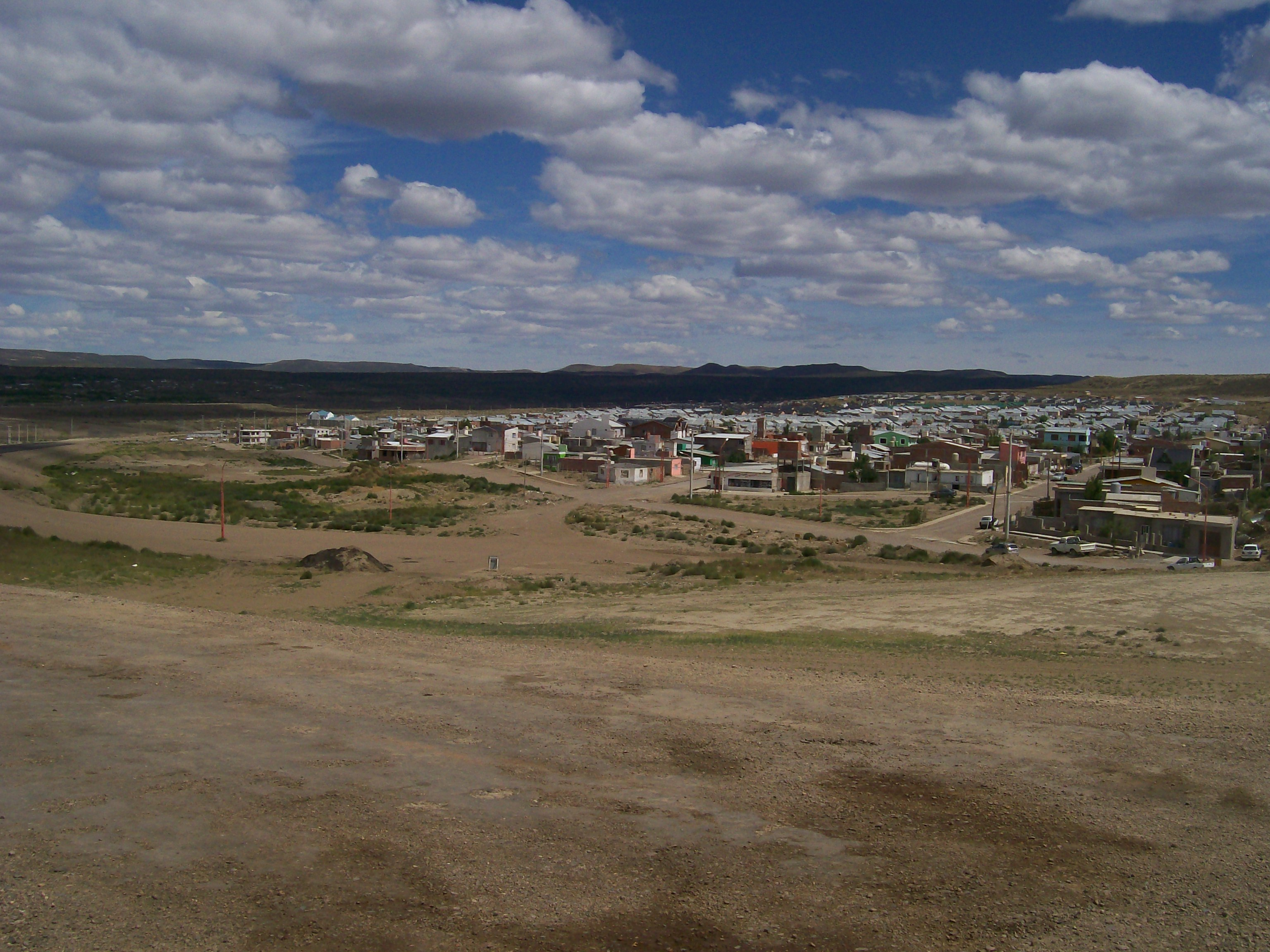 Vista al barrio populoso